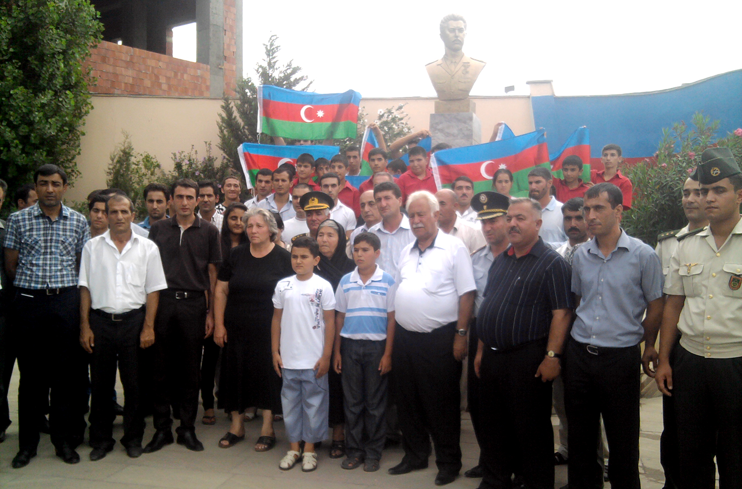 Azərbaycanın Milli Qəhrəmanı Fazil Mehdiyevin anım günü